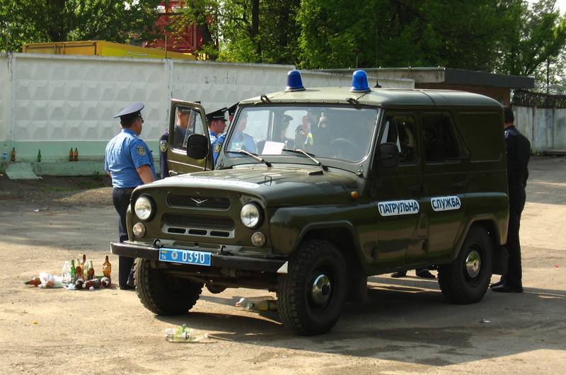 Автомобильный патруль украинской милиции